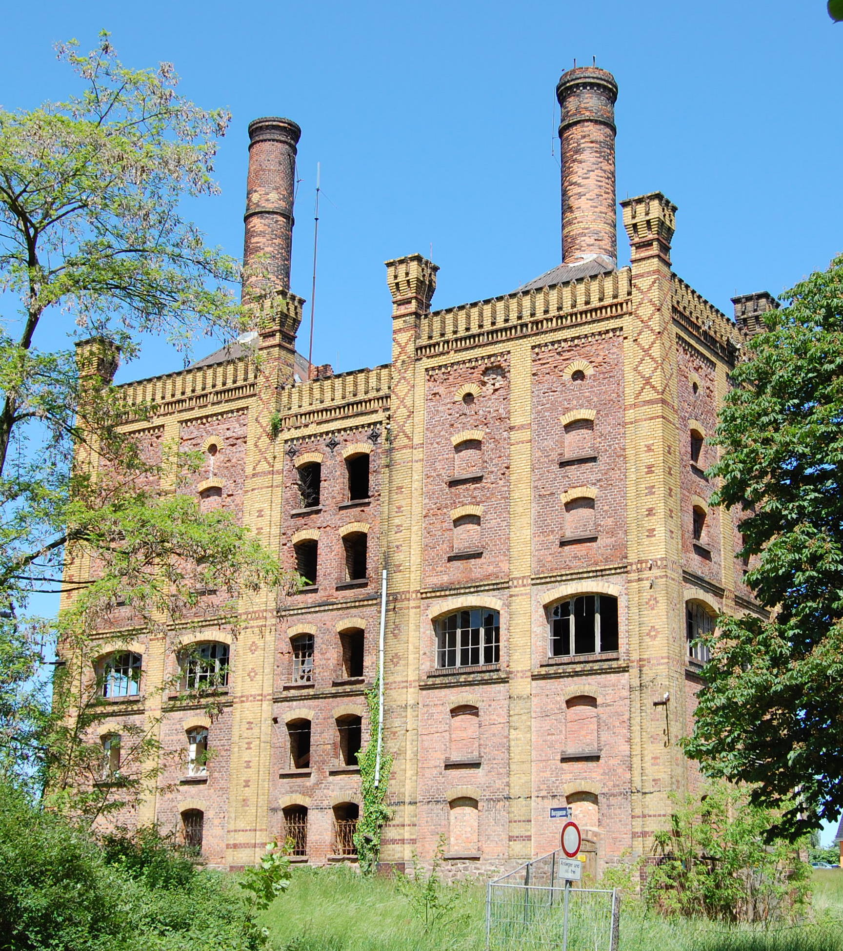 Mälzerei der ehemaligen Brauerei Behrens, Schlüter & Co., ab 1886 Bergschlößchen Brauerei Magdeburg, in Haldensleben (Sachsen-Anhalt), Bornsche Straße 81; erbaut 1872; unter Denkmalschutz; 2010 ohne Nutzung in Verfall